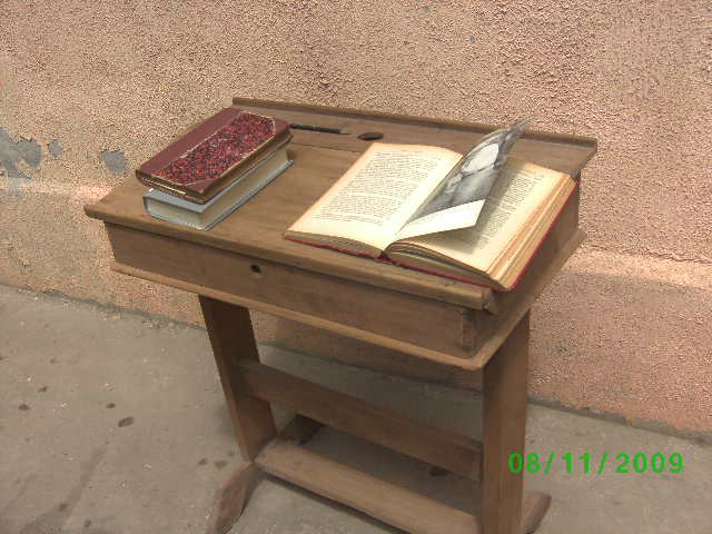 Pupitre escolar de mediados del siglo XX fotografiado en Chile